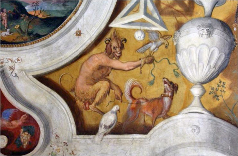 Satiro cacciatore 2 con cane e poiana